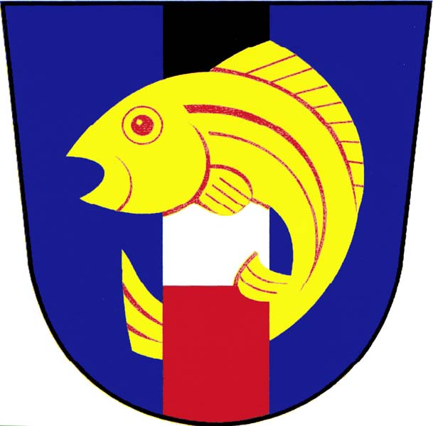 Znak obce Slavětín nad Metují